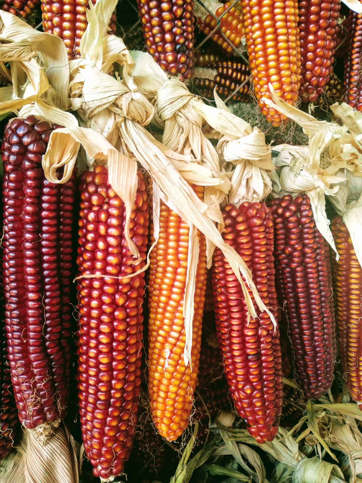 Arto gorria